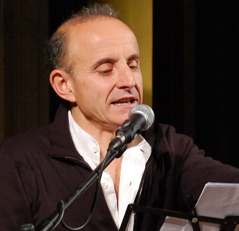 Giuseppe Cederna, "Montagne incantate" Letture di Giuseppe Cederna a Palazzo Chiericati, Vicenza, per "La notte dei libri" di Ottobre piovono libri.